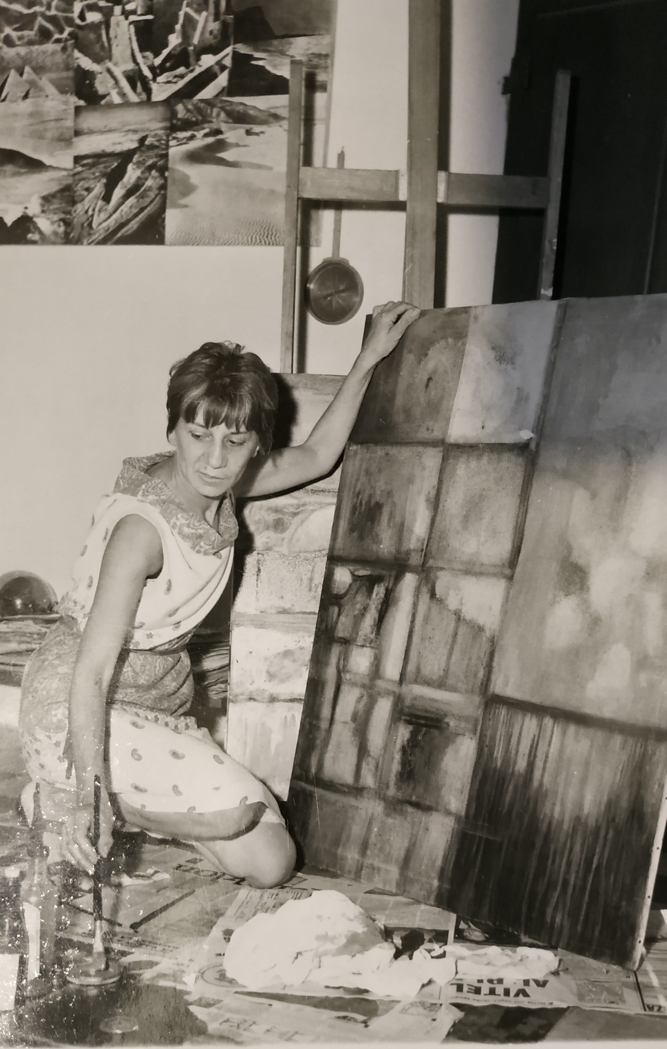 PETRONI MARIA PITTRICE nello studio di Bologna, 1960